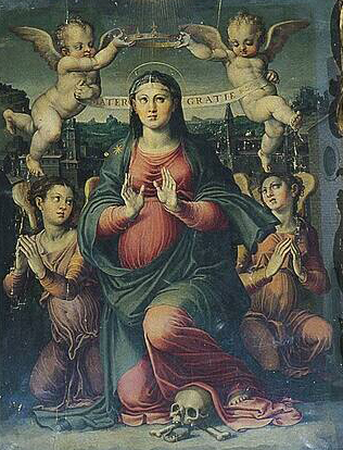 Un particolare degli interni della chiesa di Santa Maria delle Grazie a Sansepolcro